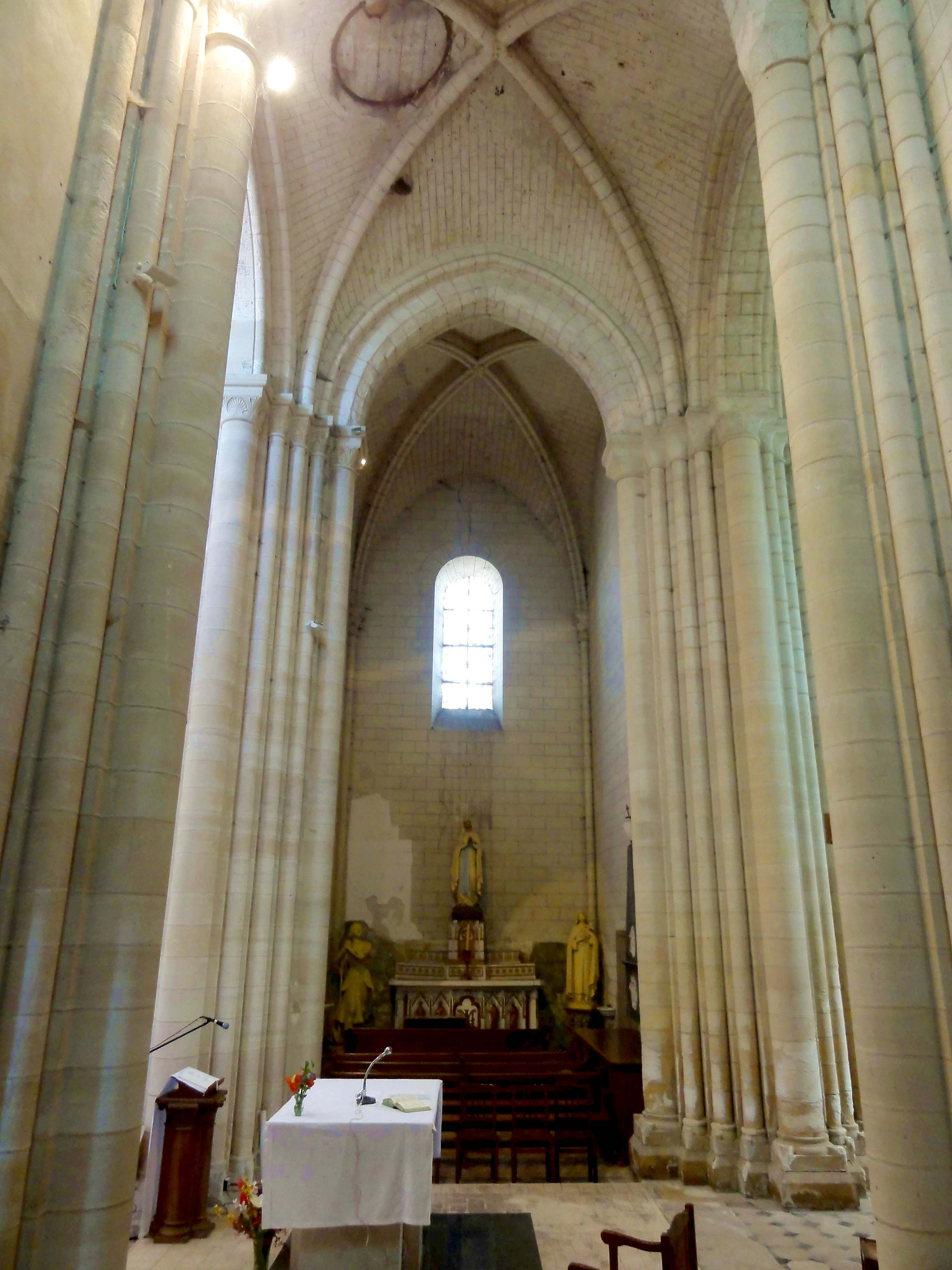 Intérieur de l'église - voir titre.